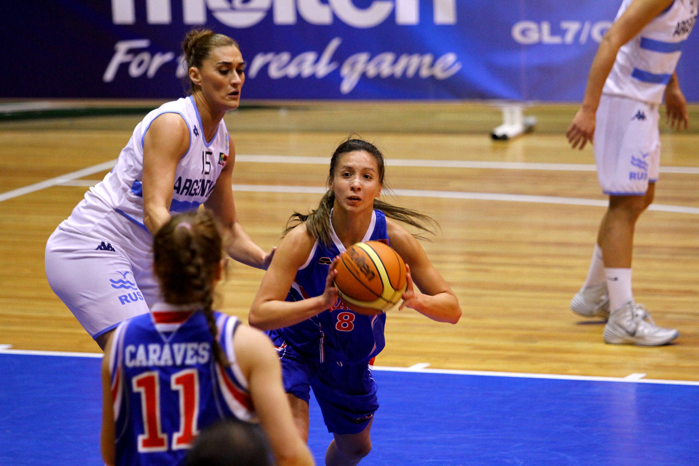 Ambato (Tungurahua) 14 de agosto de 2014 (Andes).- Inició el Campeonato Sudamericano de baloncesto Femenino Ambato 2014. Argentina (blanco) vs Paraguay (celeste). Foto: Luis Astudillo C.